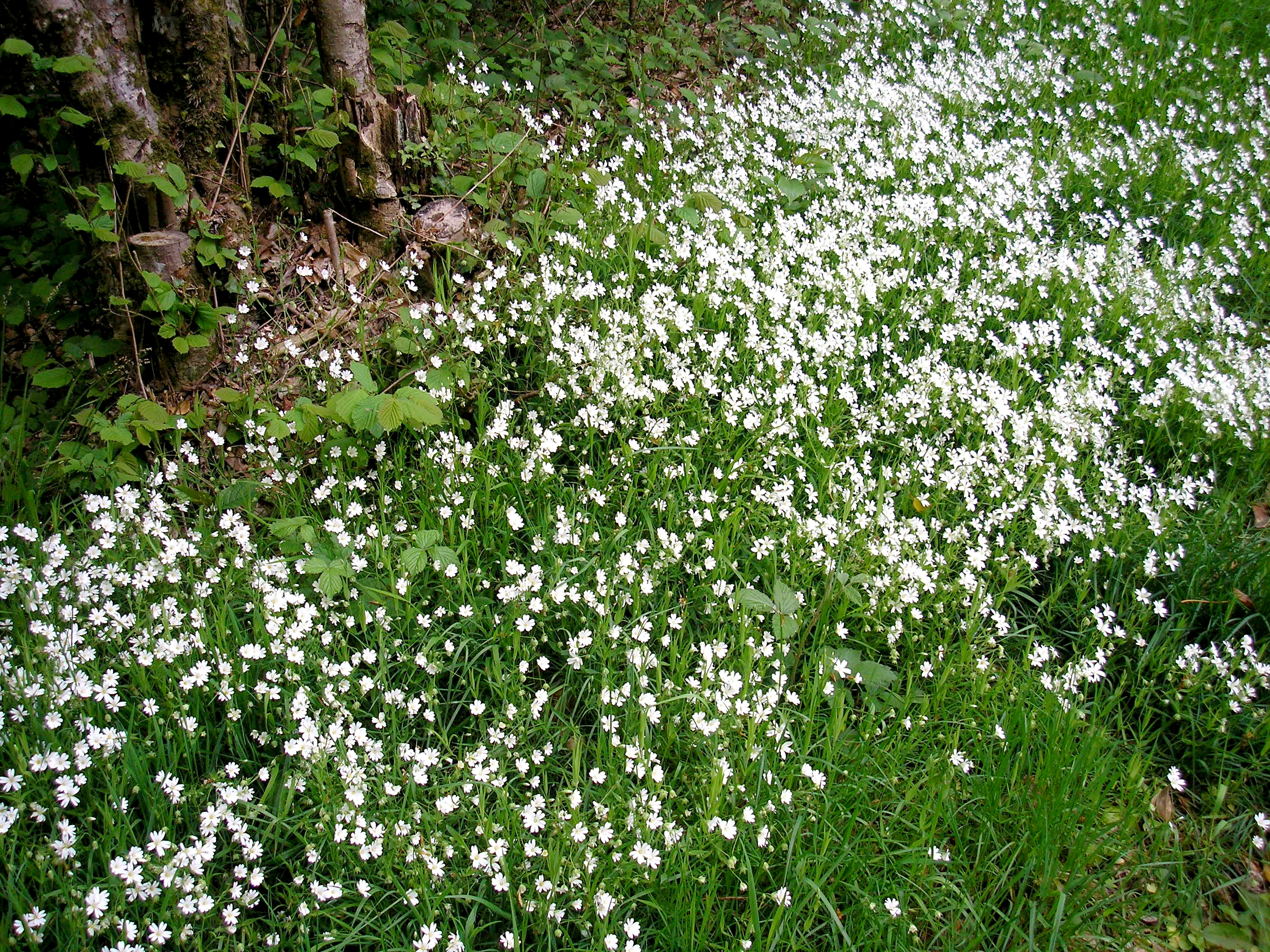 Tapis de stellaires holostées (Stellaria holostea) à Pontécoulant (Normandie, France).